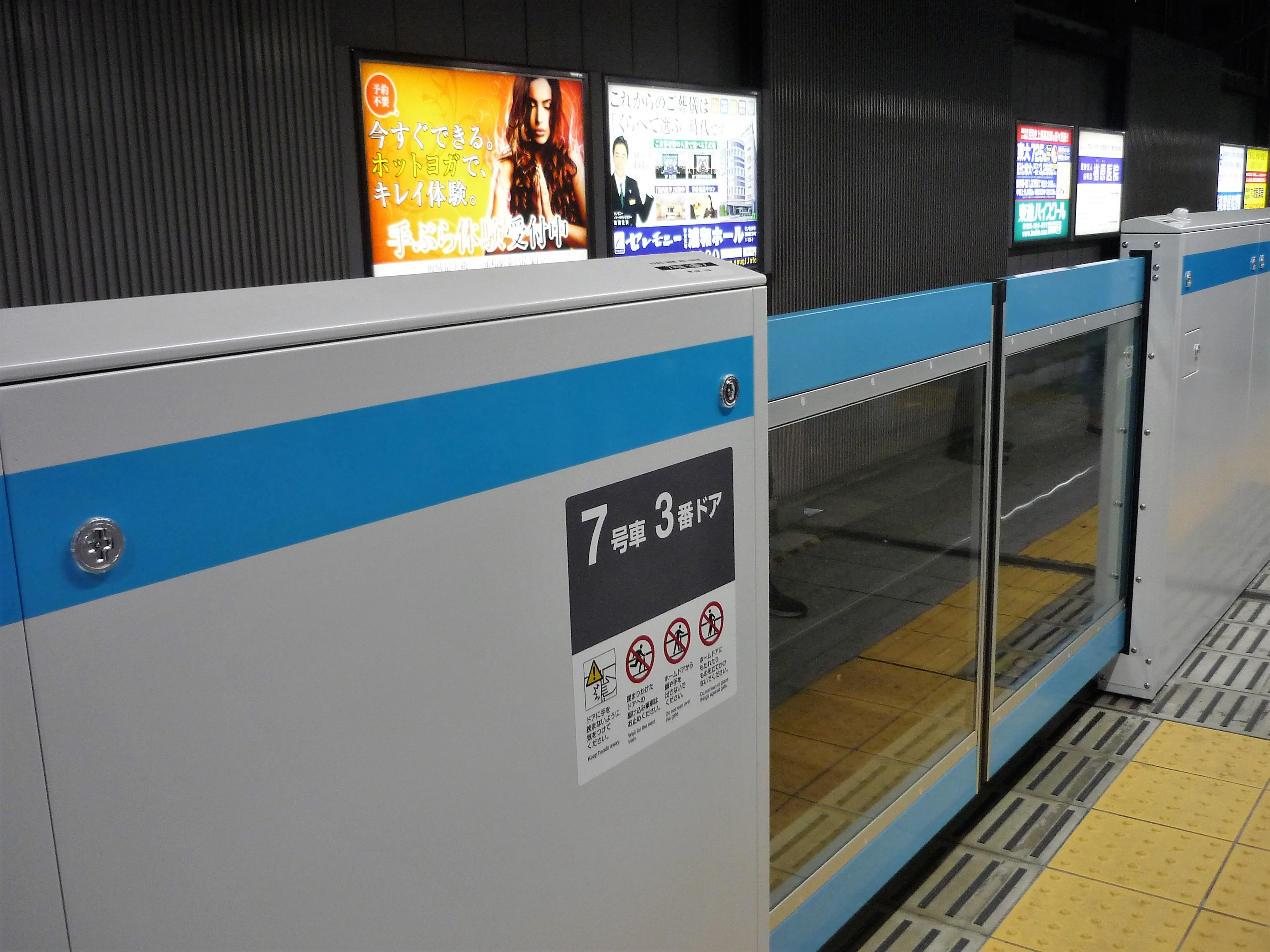 浦和駅京浜東北線ホームに設置されたホームドア Panasonic Lumix DMC-FS3